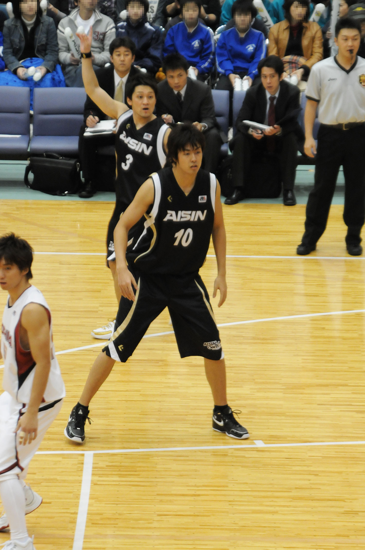 アイシンシーホースの竹内公輔選手。琴丘総合体育館で。